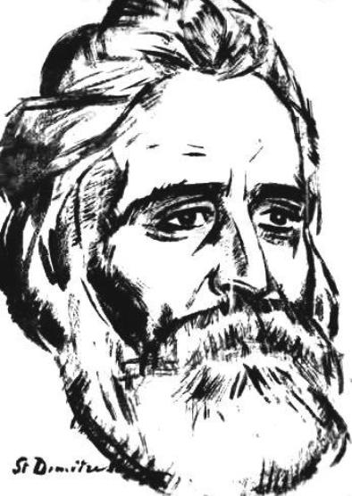 Portretul criticului Garabet Ibraileanu